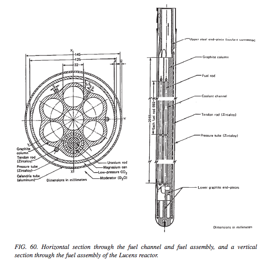 Configurazione degli elemeneti di combustibile usati nel reattore di Lucens (Svizzera) [fonte: IAEA].